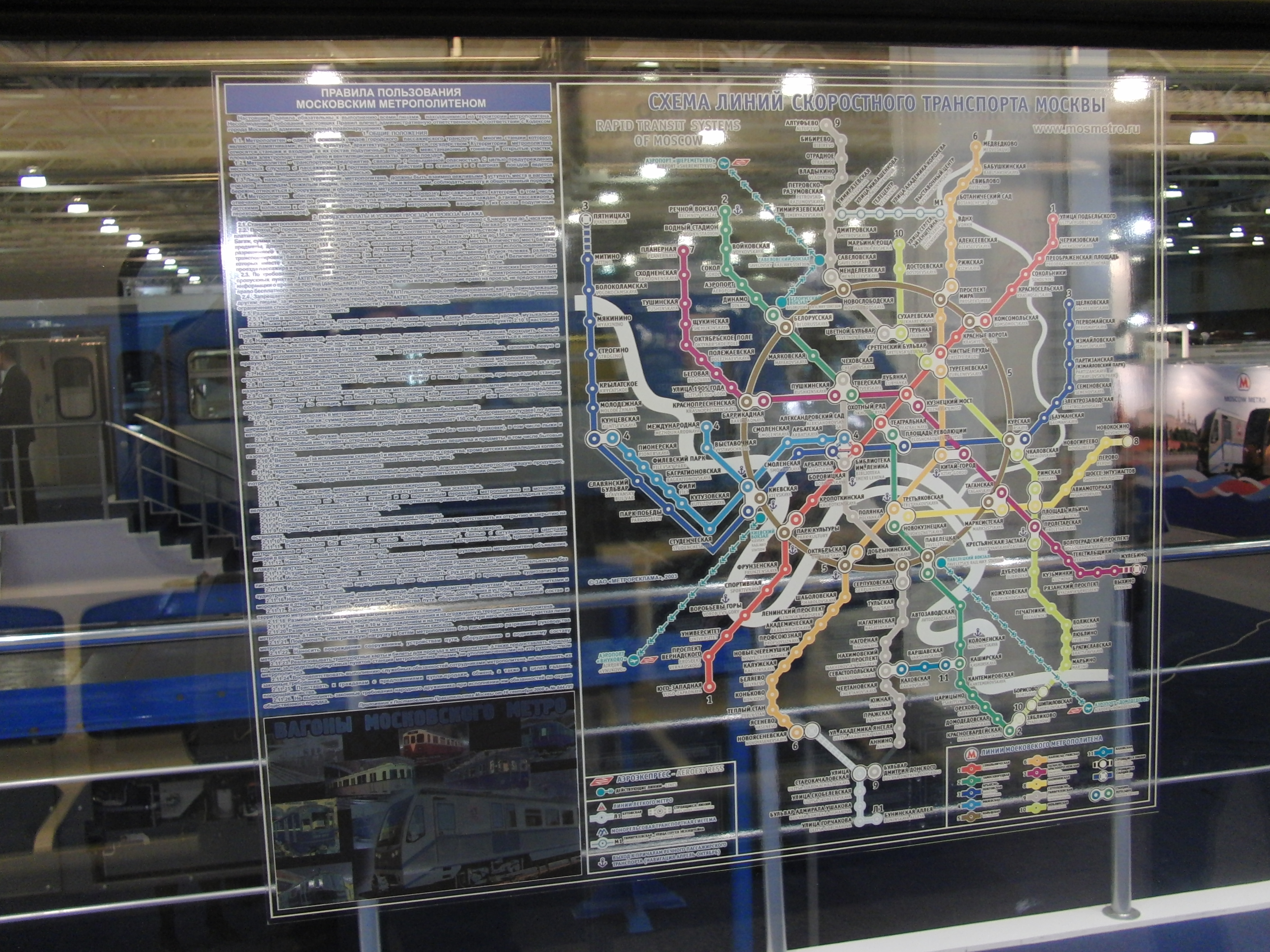 Вагон типа 81-760 на выставке «Экспосититранс 2010».